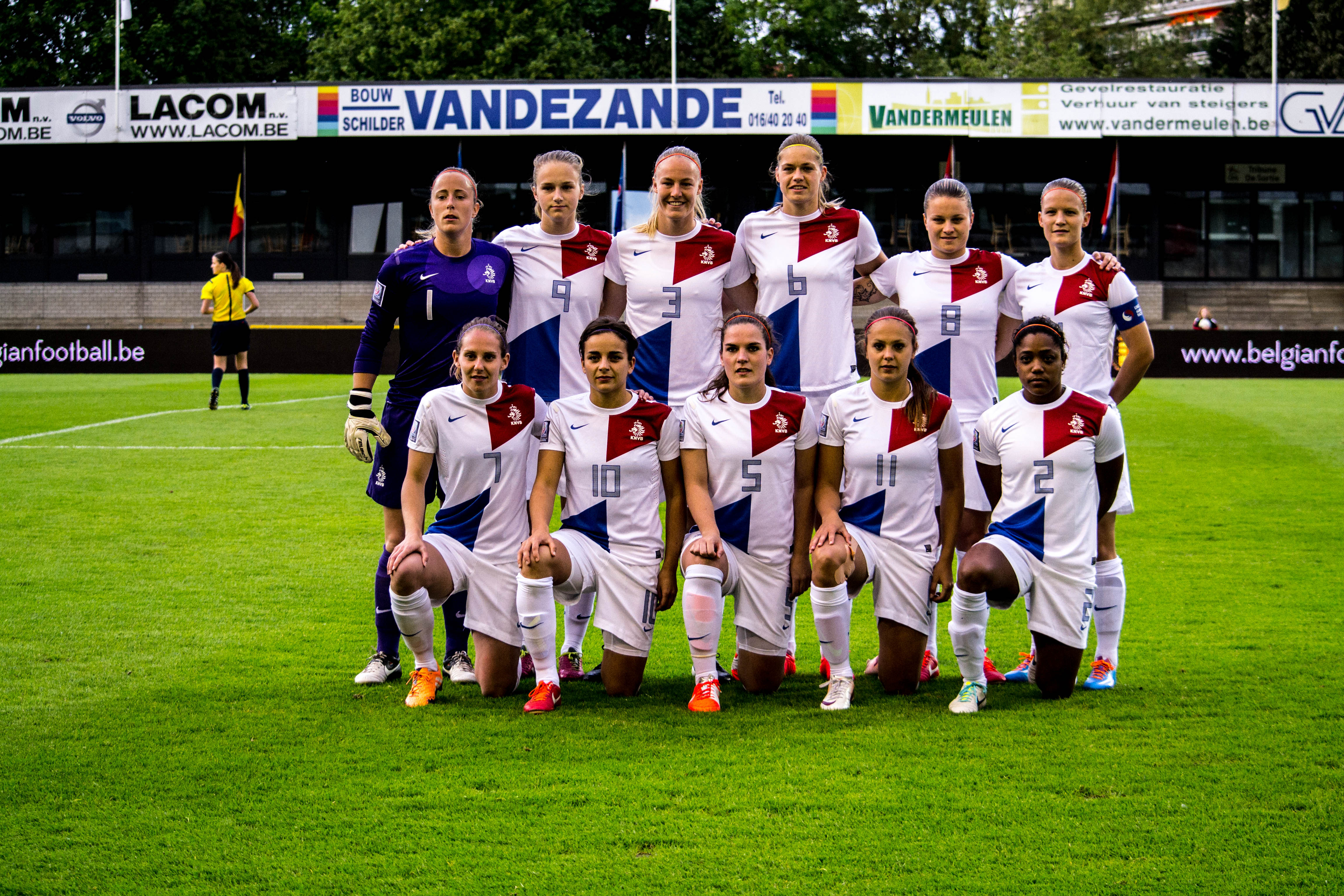 StampMedia